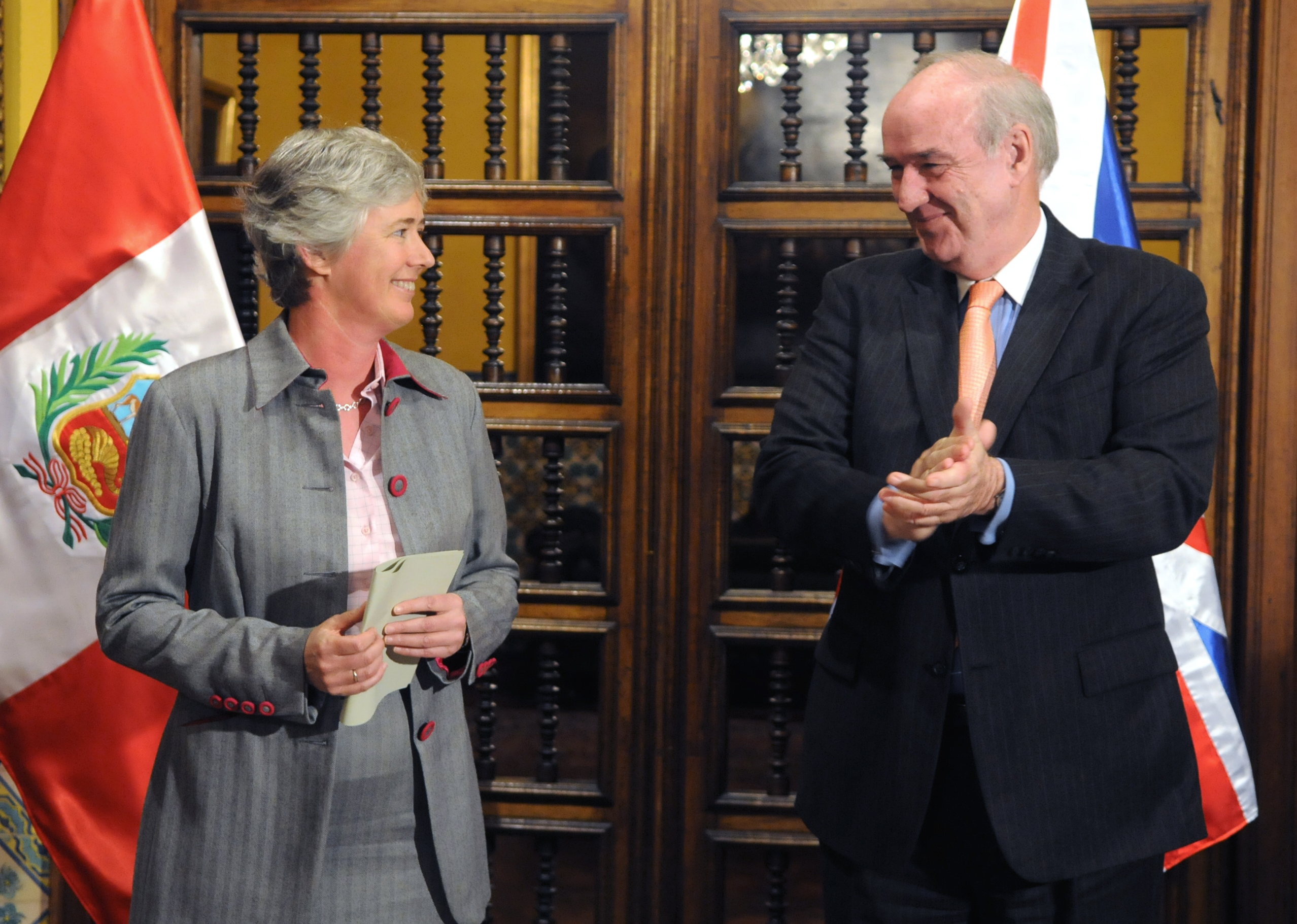 El Ministro de Relaciones Exteriores, José A. García Belaunde, despidió a la Embajadora del Reino Unido de Gran Bretaña e Irlanda del Norte en el Perú, Catherine Nettleton